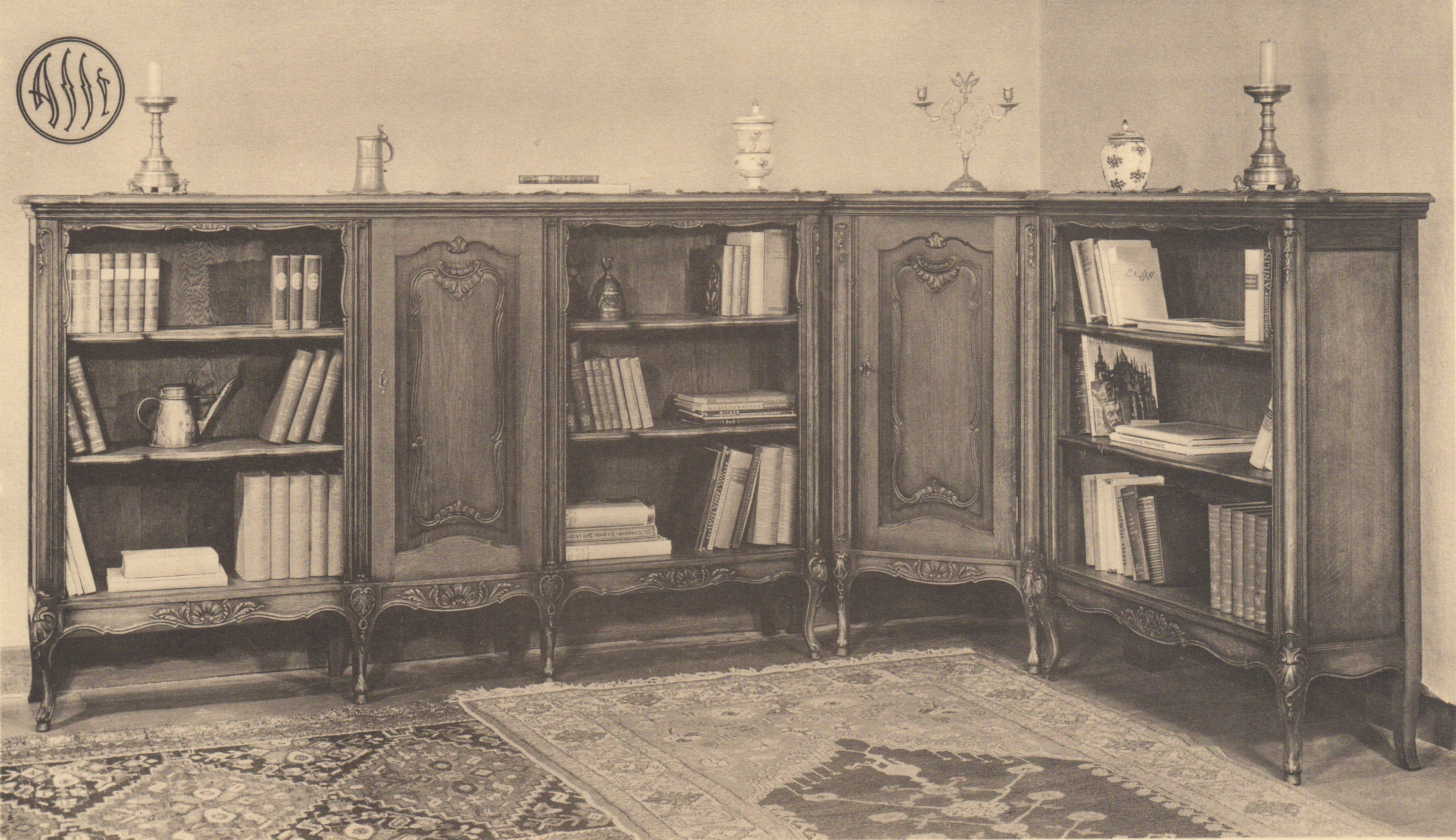 Katalogabbildung 1958, Anbaumöbel (von links): Schrankregal „Couven“, Eckschrank „Mattern“, Bücherregal „Hundt“ in Aachen-Lütticher Barock